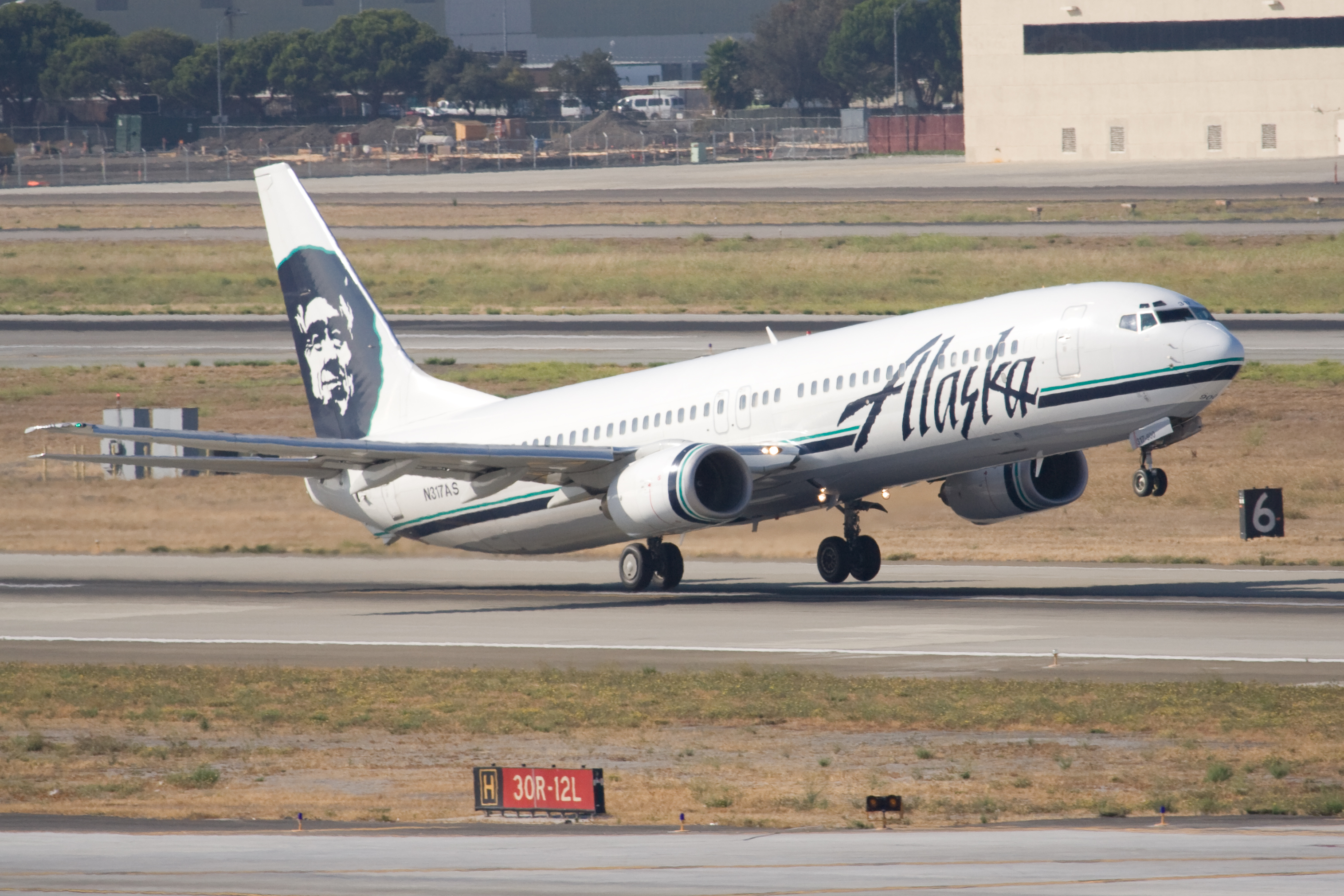 Alaska 313